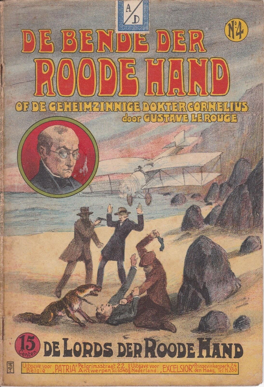 Gustave Le Rouge, Le mystérieux docteur Cornélius, Anvers, Éditions Patria, fascicule n°4, 1927. Couverture illustrée par Julien T'Felt.